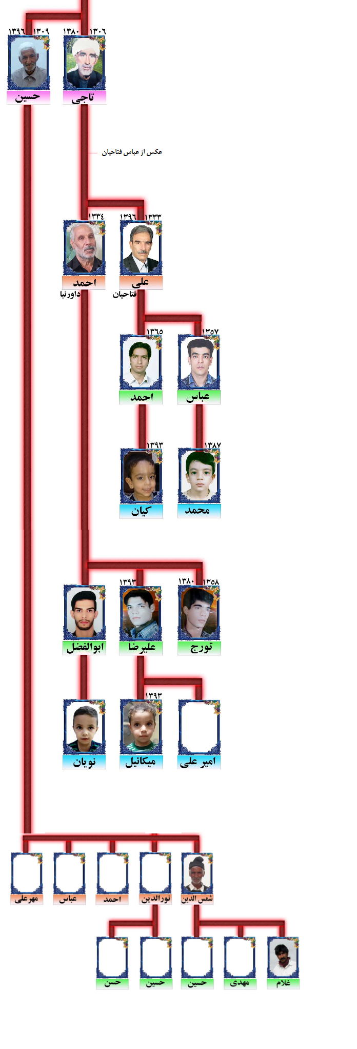 پسران علیمراد درویش